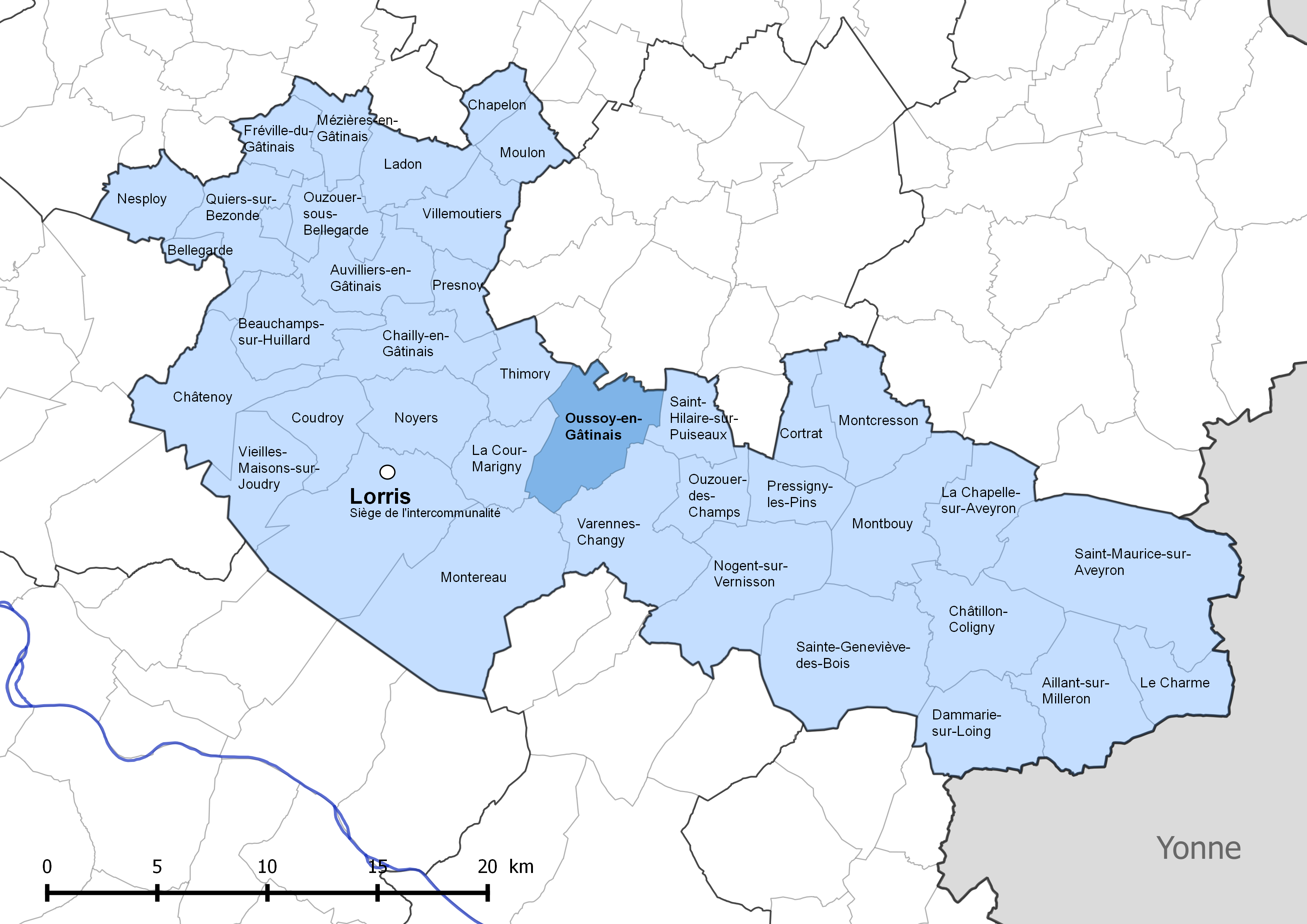 Périmètre de la communauté de communes Canaux et forêts en Gâtinais - Situation de la commune de Oussoy-en-Gâtinais.